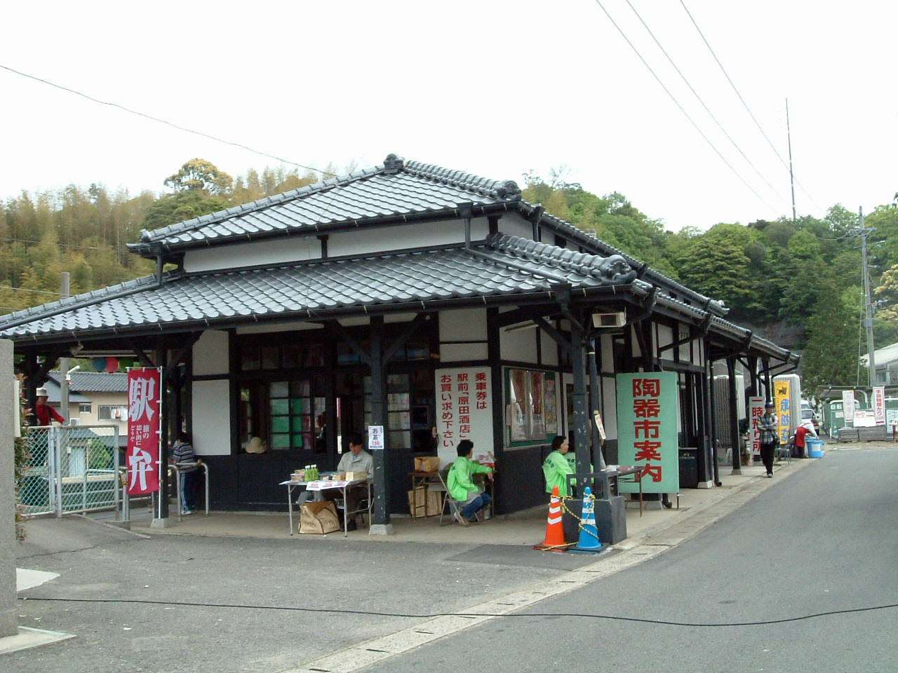 JR九州上有田駅（陶器市期間中）JR-Kyushu Kami-Arita Station